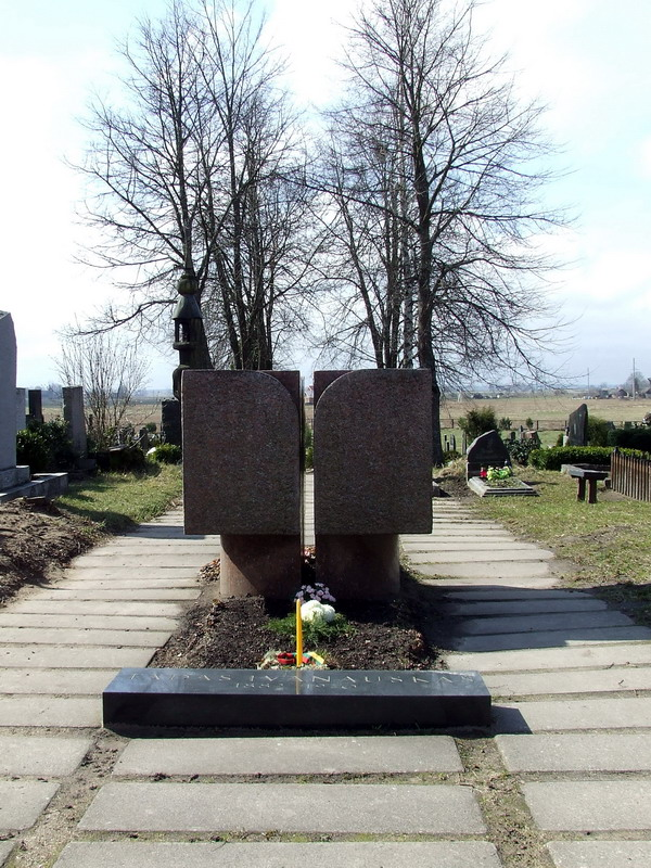 Tado Ivanausko kapas Tabariškių kapinėse, Kauno raj.